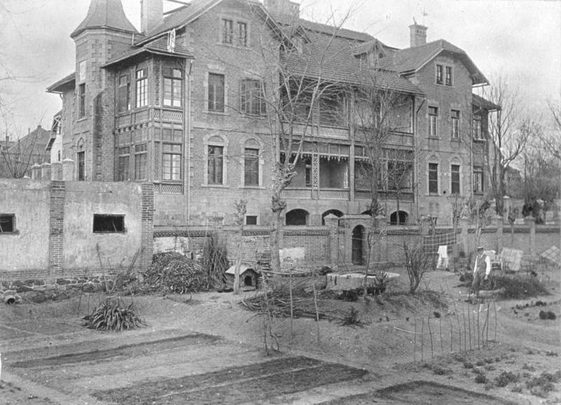 Tsingtau, Deutsche Schule China, Tsingtau.- Deutsche Schule (Hunan-Road).